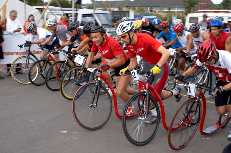 Le gare di scooter iniziano al Wm 2007 a St. Wendel